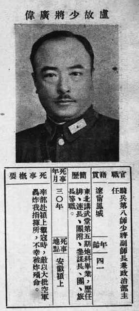 中文（台灣）: 抗戰軍人忠烈錄第一輯中的烈士遺像